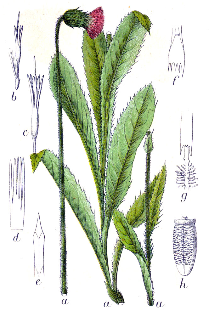 Carduus defloratus L. Original Caption Langstielige Distel, Carduus defloratus